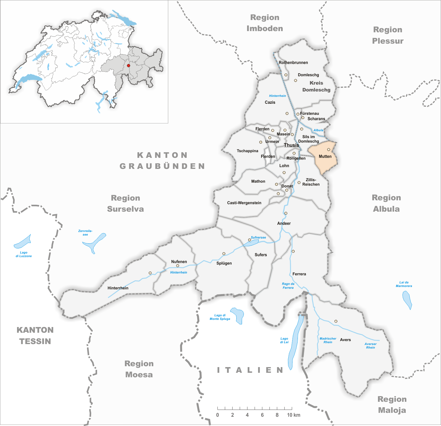 Municipality Mutten